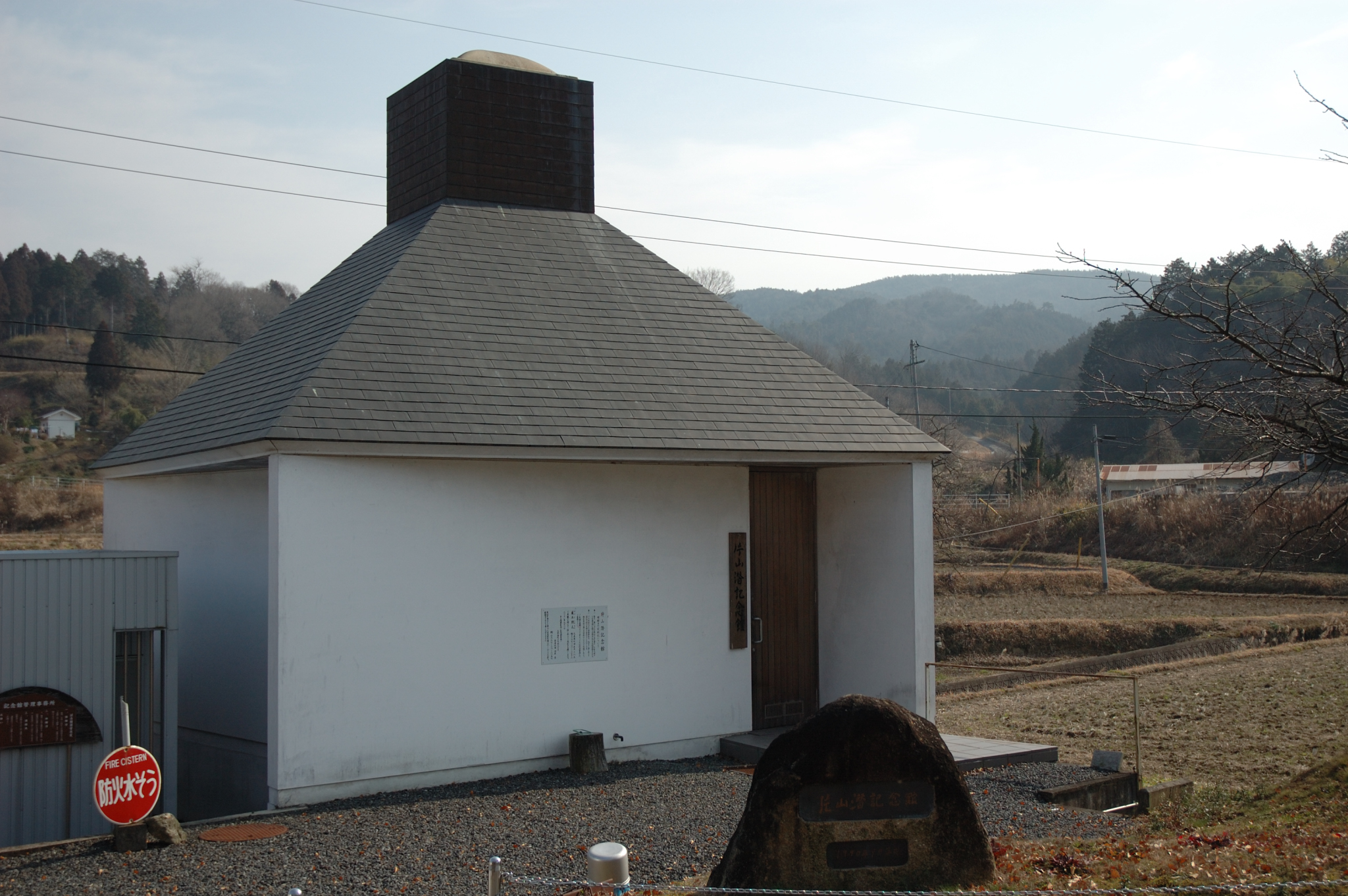 Katayama Sen Memorial in Kumenan, Kume, Okayama, Japan